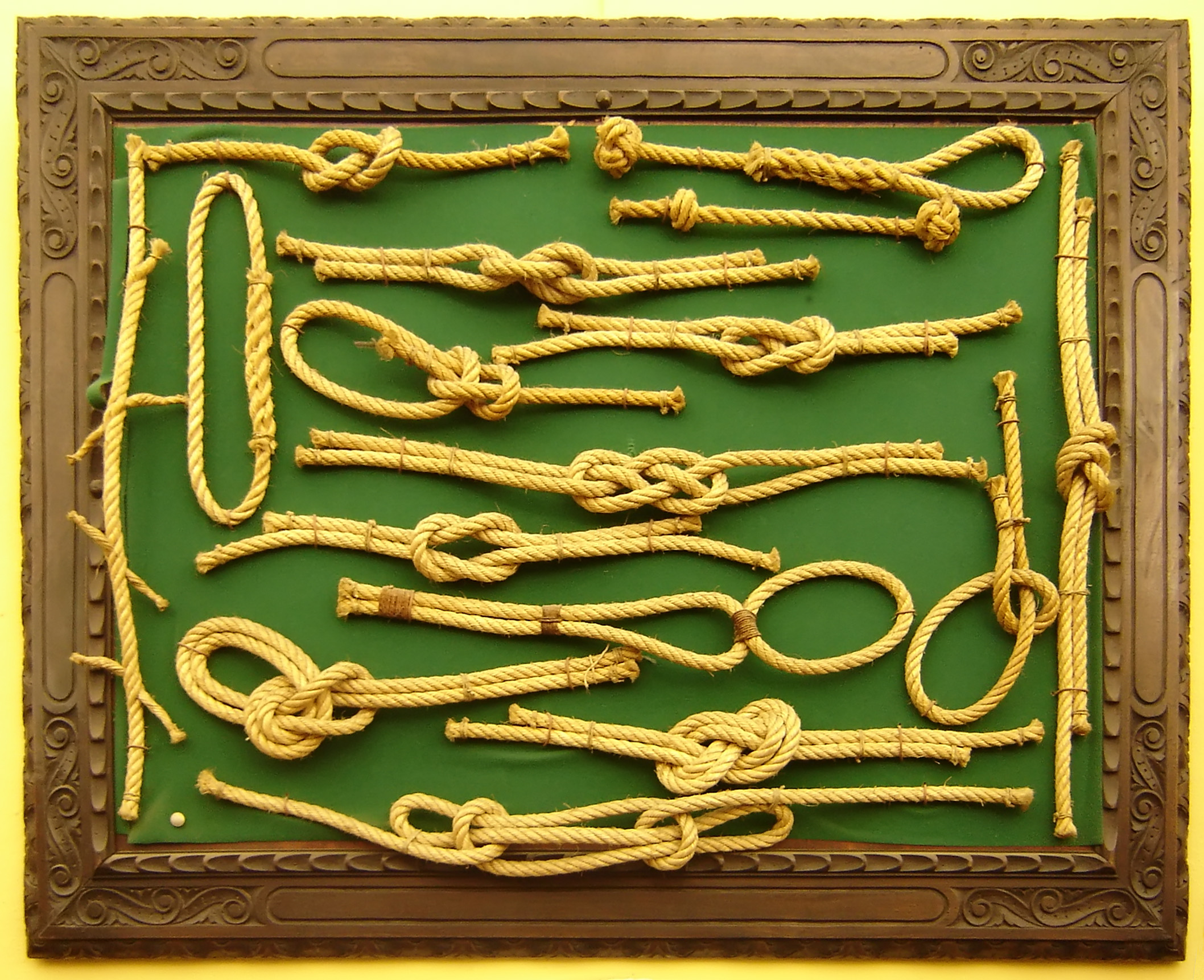 Nudos marineros (Museo Naval, Sevilla, España).